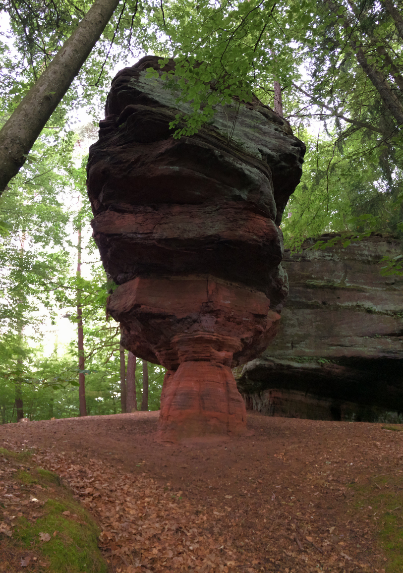 Kanzelfels bei Pirmasens